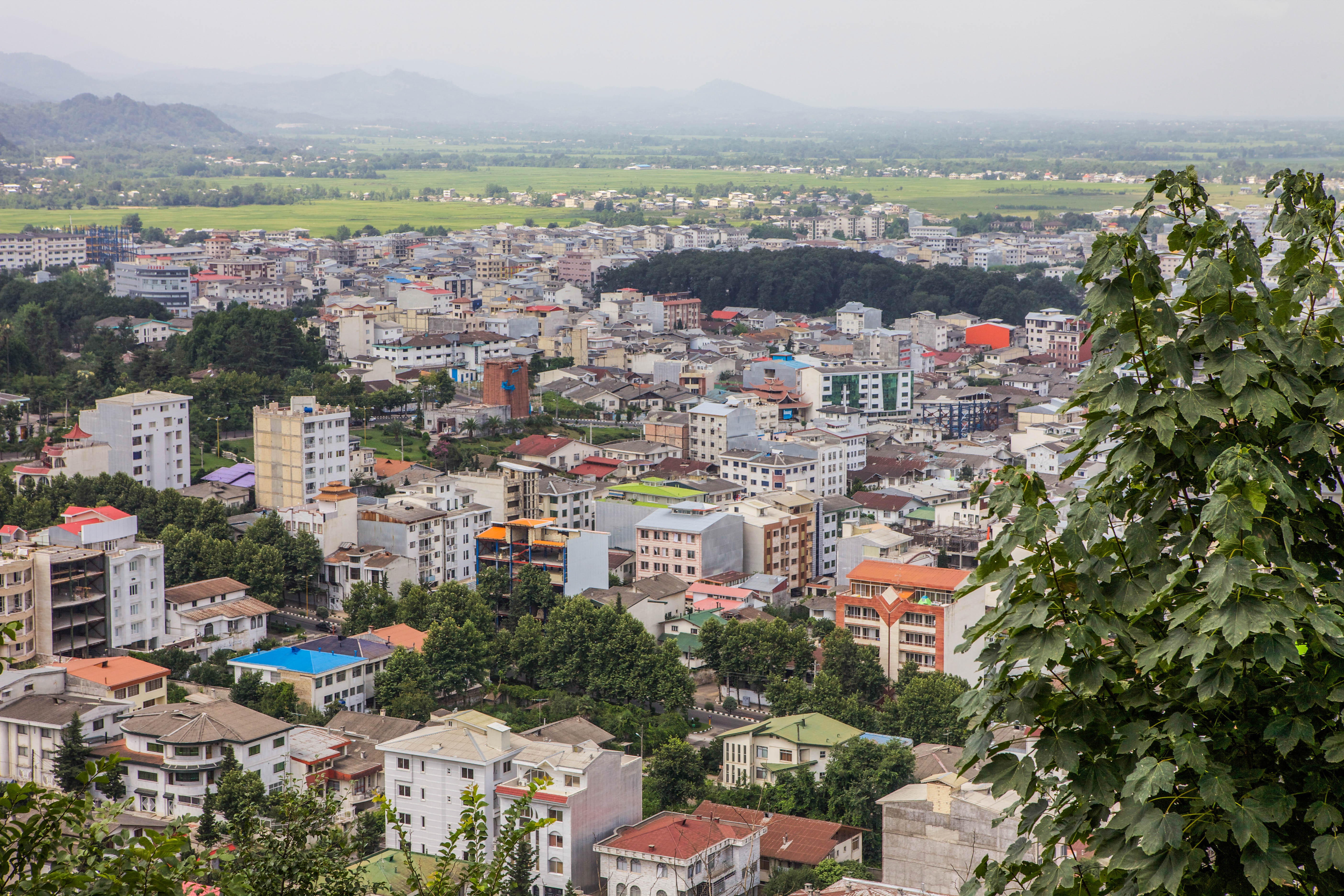 Lahijan, Caspian Sea Coast, Iran